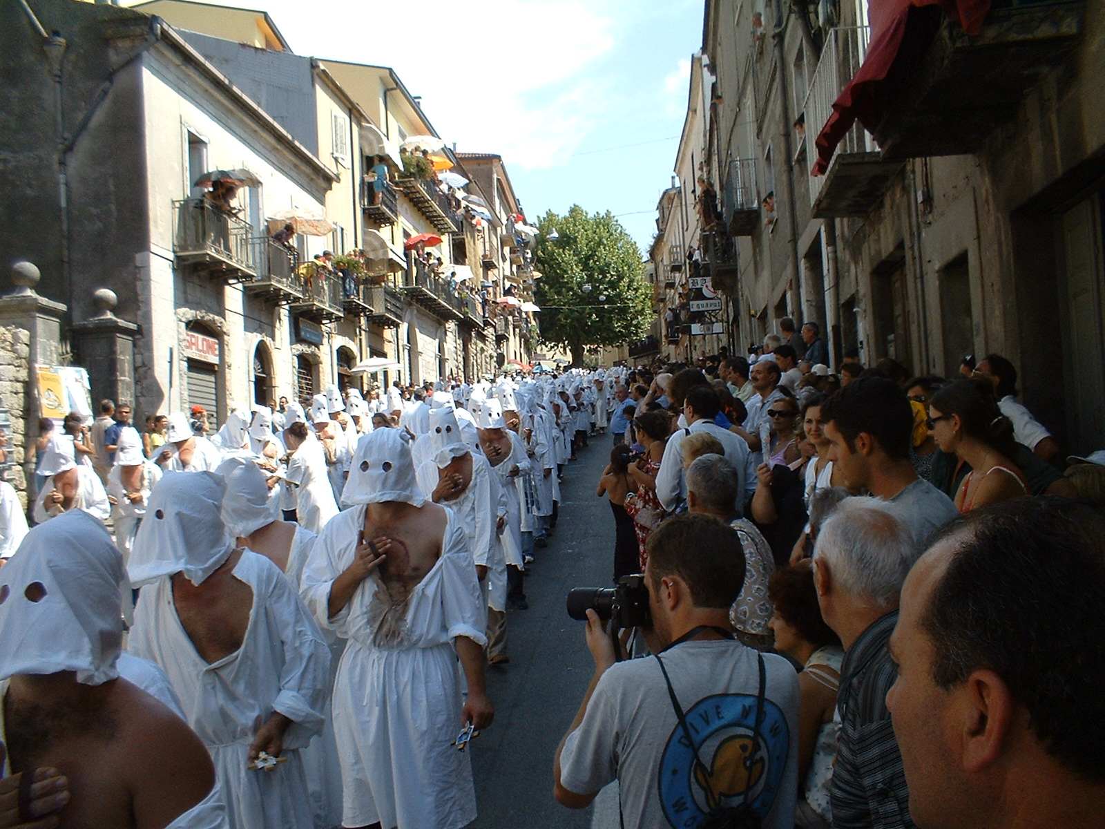 processione dei battanti di Guardia Sanframondi